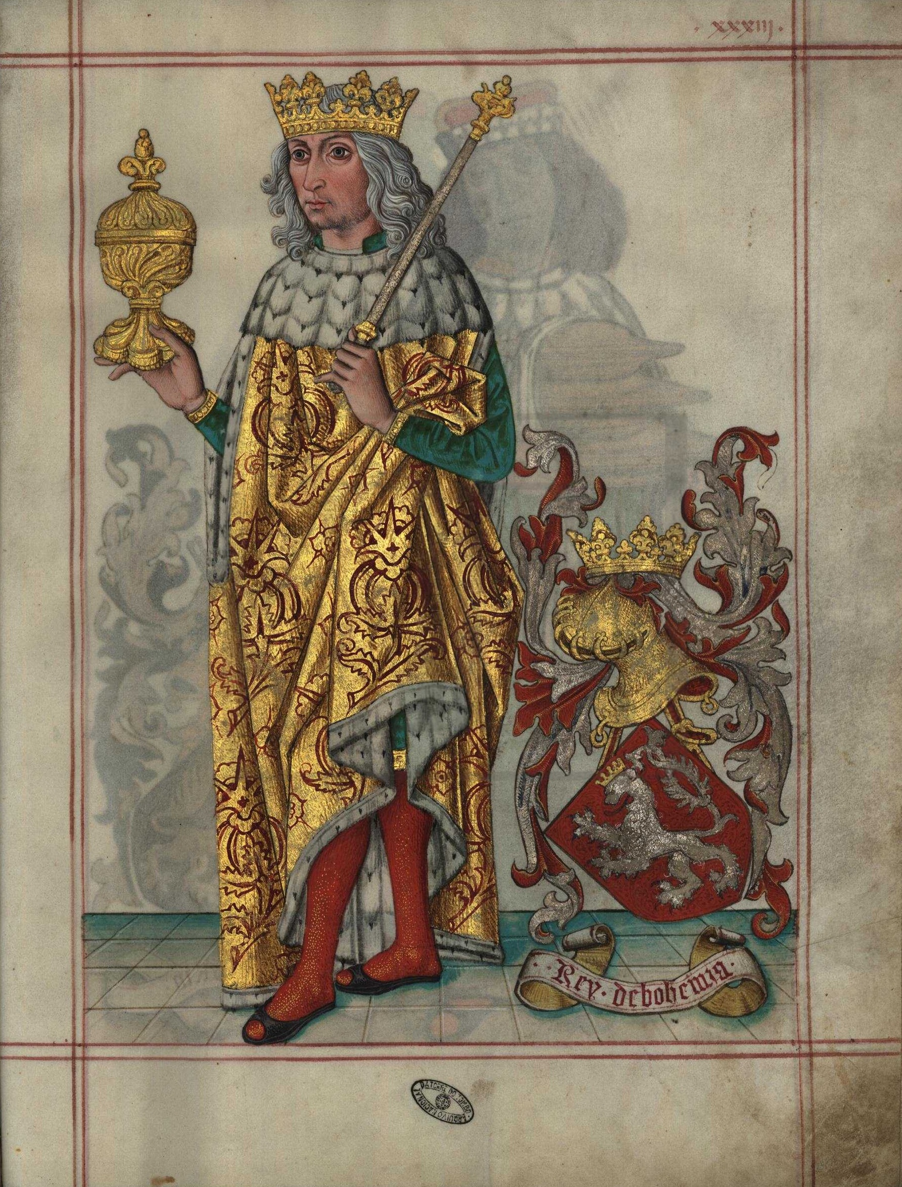 Livro do Armeiro-Mor, Rei da Bohémia (fl 33)